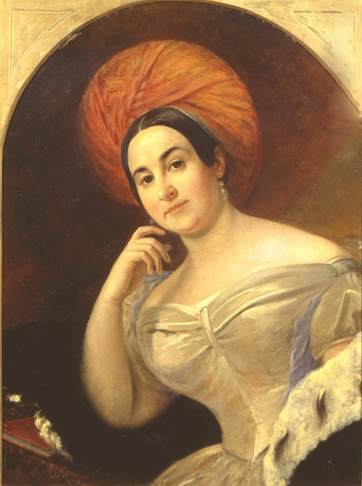 актриса Екатерина Семенова